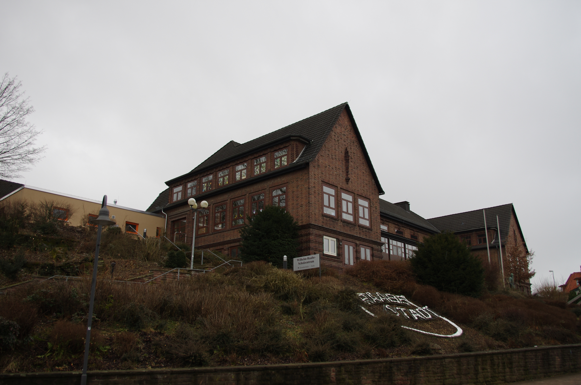 Die Wilhelm-Raabe-Schule in Eschershausen. Sie liegt direkt gegenüber vom Rathaus.